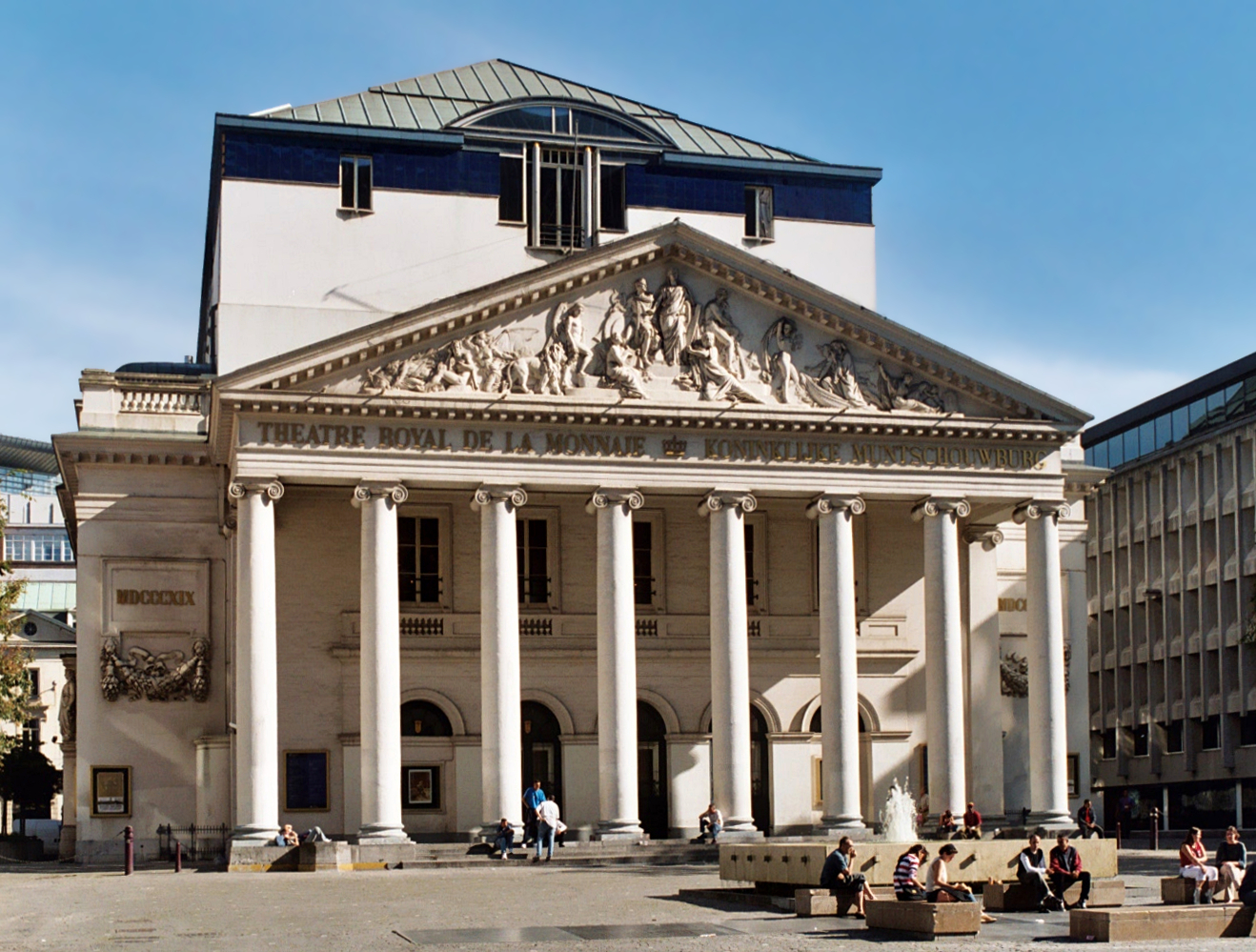 Belgique - Bruxelles - Théâtre de la Monnaie